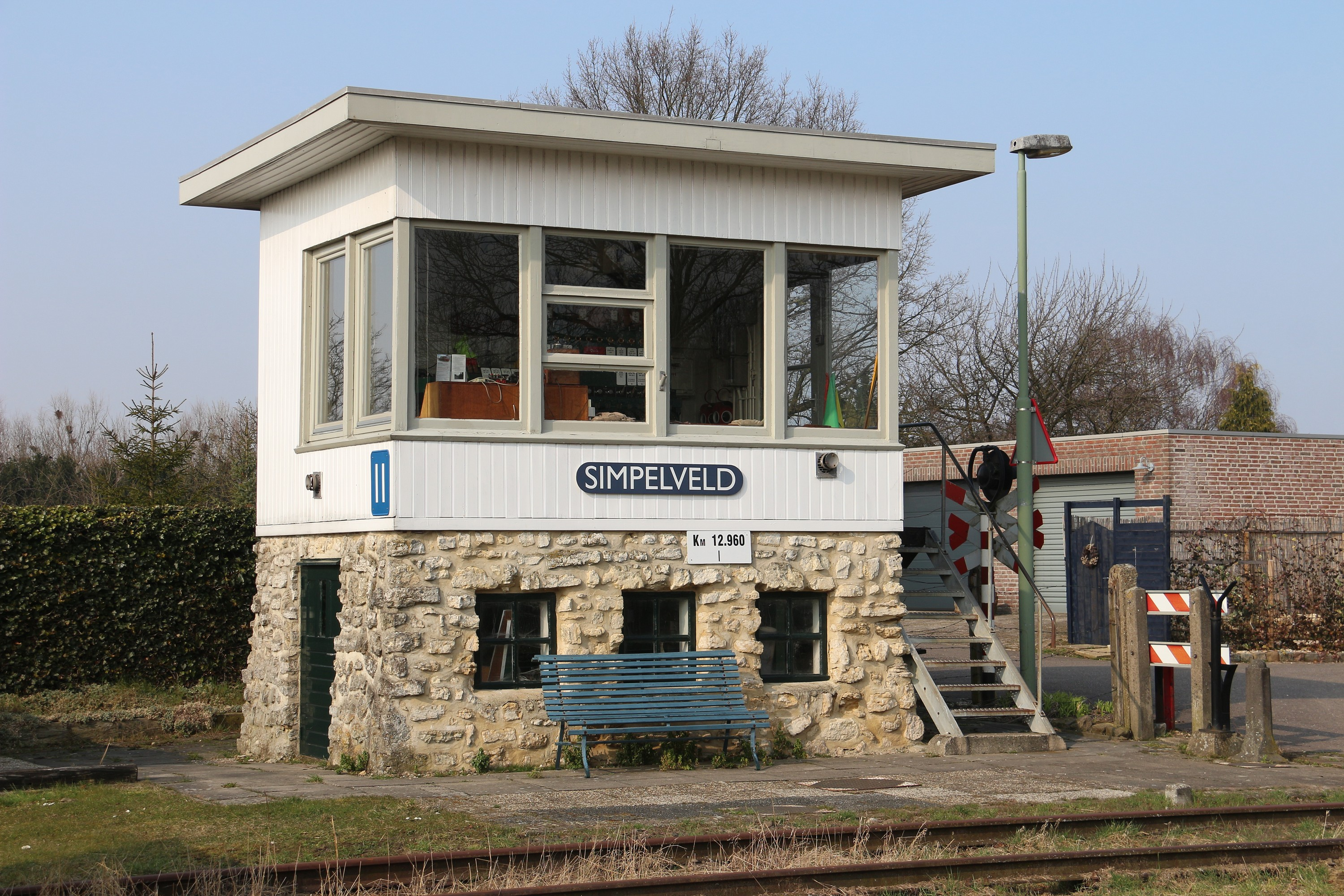 Post II te Simpelveld, Zuid-Limburgse Stoomtrein Maatschappij